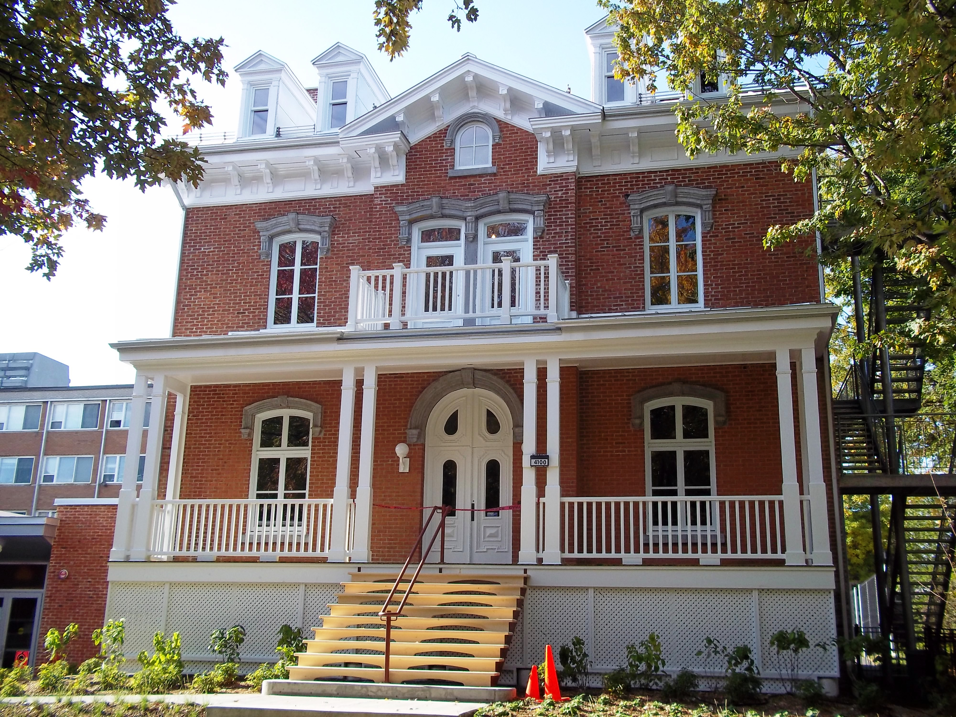 Maison Henriette-Moreau, 4100, avenue De Lorimier, Montréal